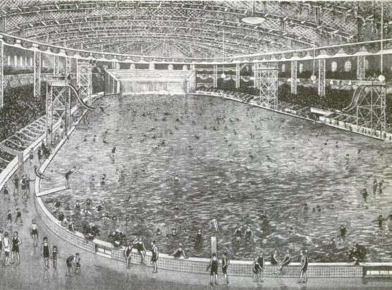 Bildunterschift: showing the Enormous Swimming Pool. Recently Provided in Madison Square Garden, New York: The Pool will Accommodate 4,000 People at one Time. At the Farther End of the Pool is a Waterfall 25 Feet High. Seats Accommodating Thousands of Spectators Line the Sides of the Pool. in